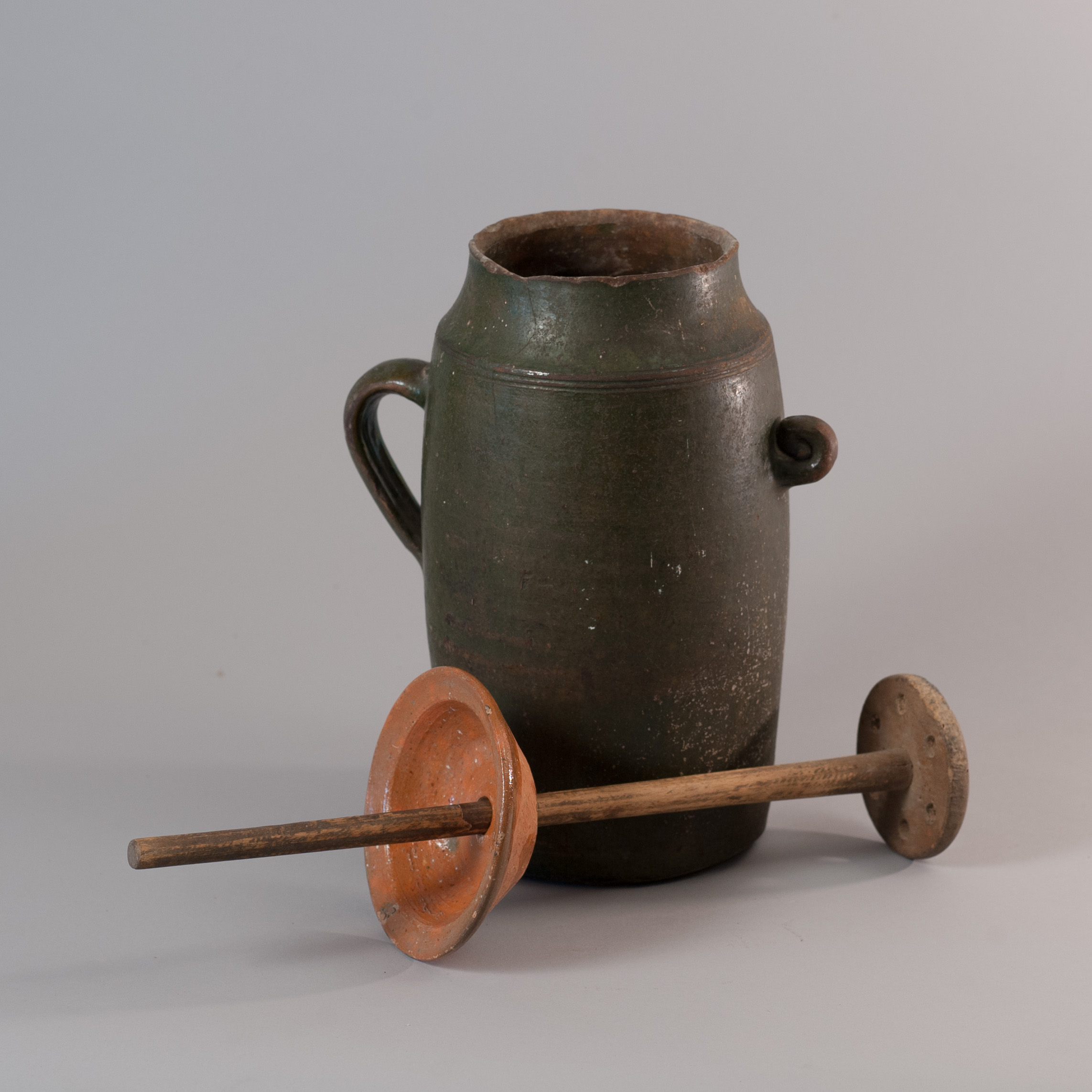 Majolikasammlung Bad Radkersburg